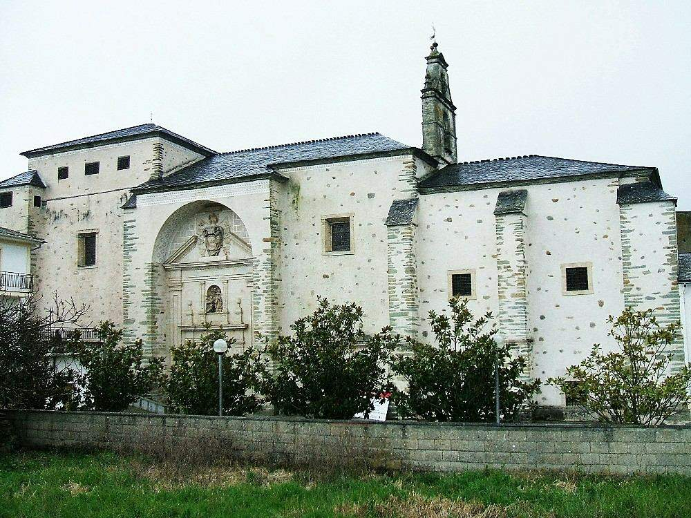 Villafranca del Bierzo - Monasterio de la Anunciada